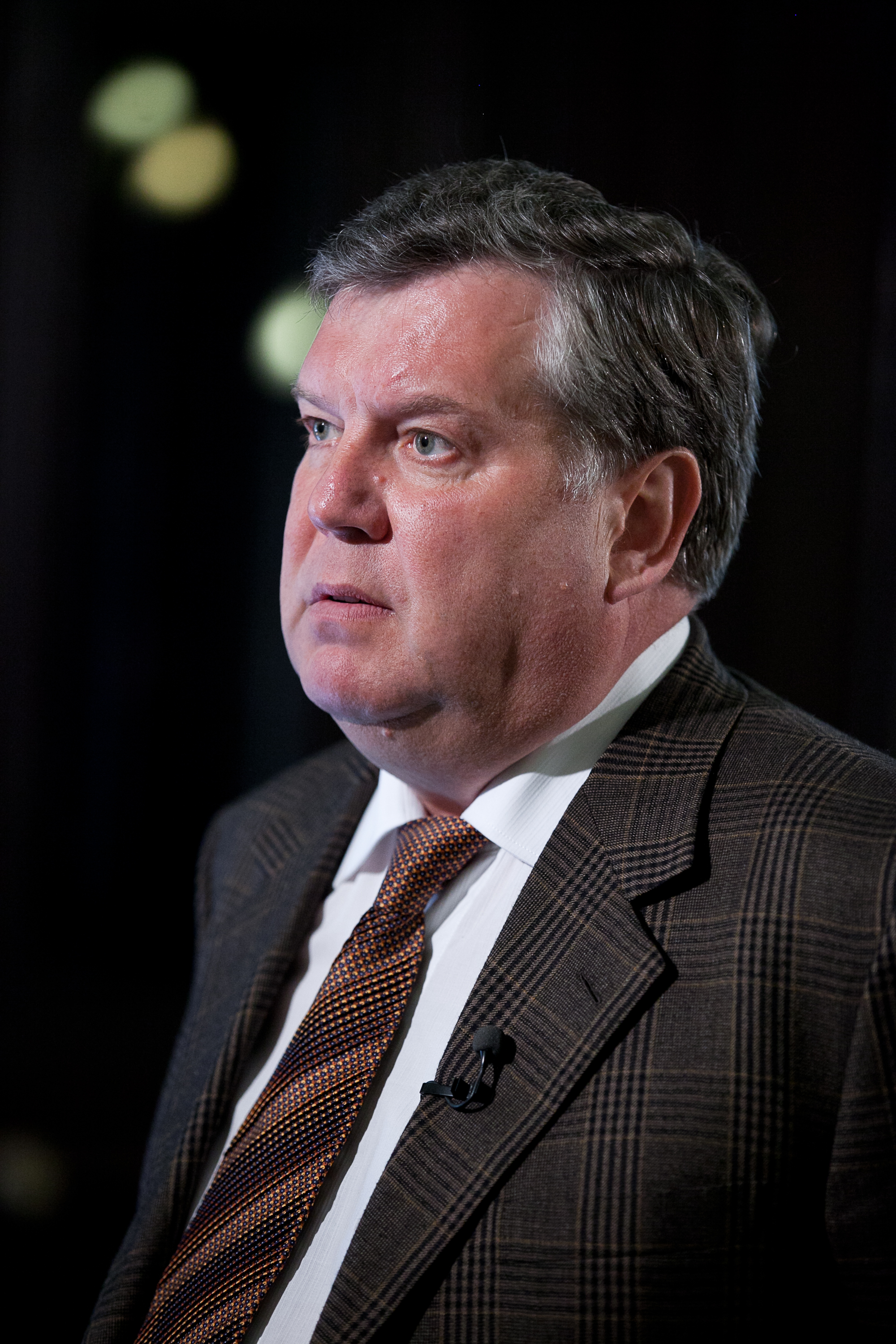 2012.gada 24.maijs. Darbs Saeimas sēdē. Foto: Ernests Dinka, Saeimas Kanceleja